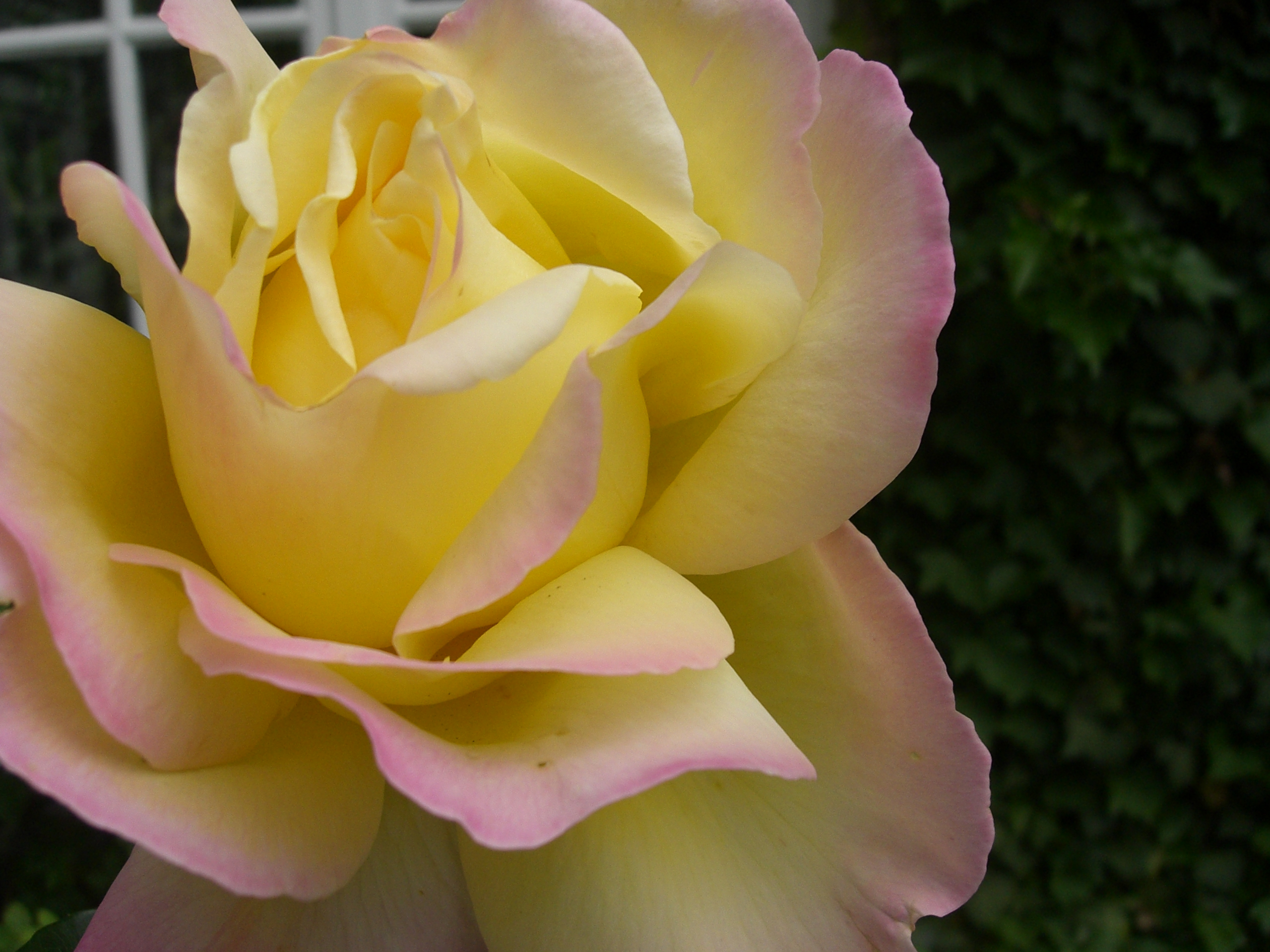 gelb-rosa Rose (eig. Foto)